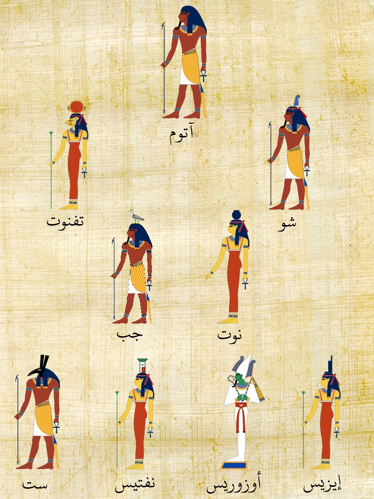 صورة شجرة نسب تاسوع هليوبوليس (إيون) المقدس.